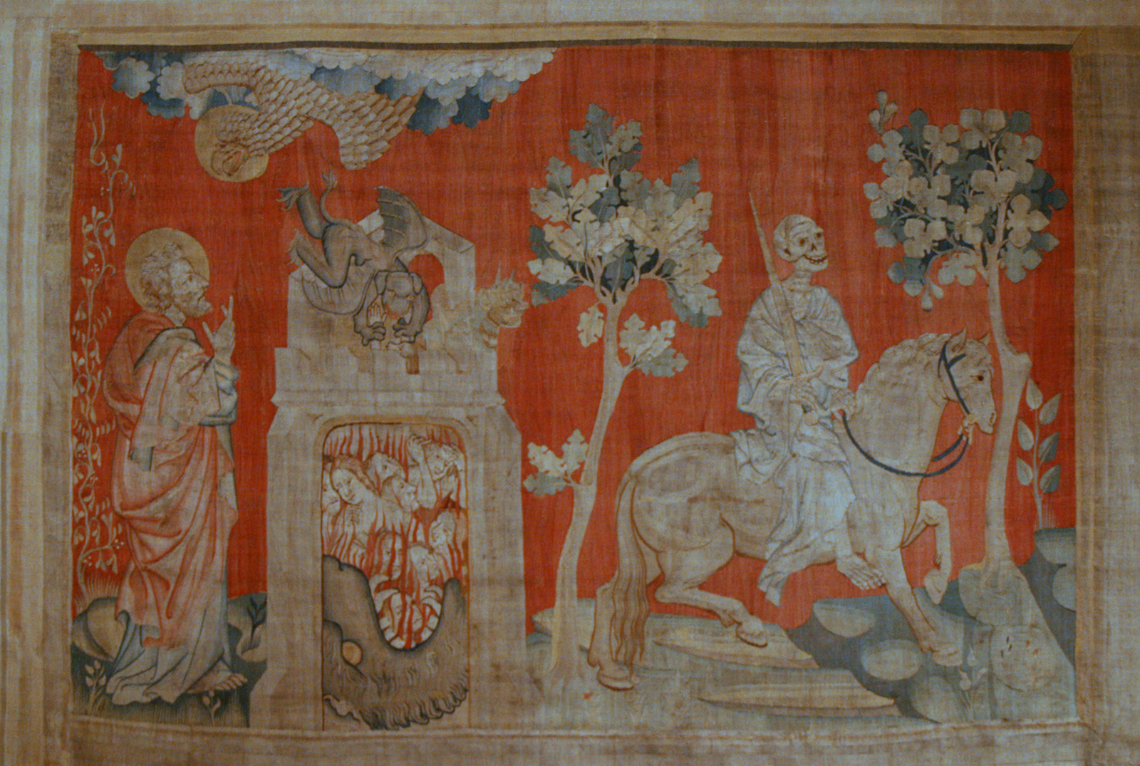 L'Apocalypse au château d'Angers